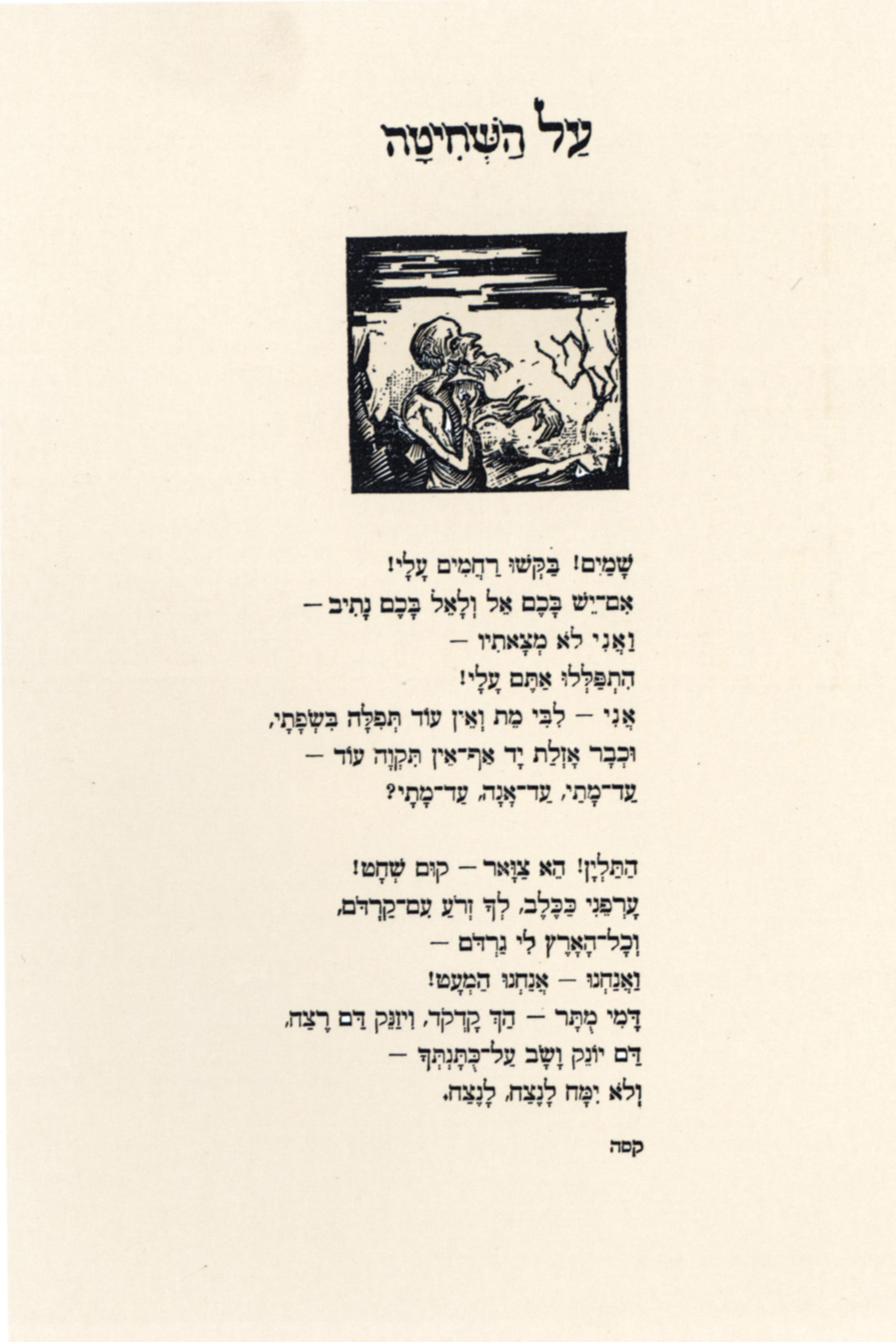 Print